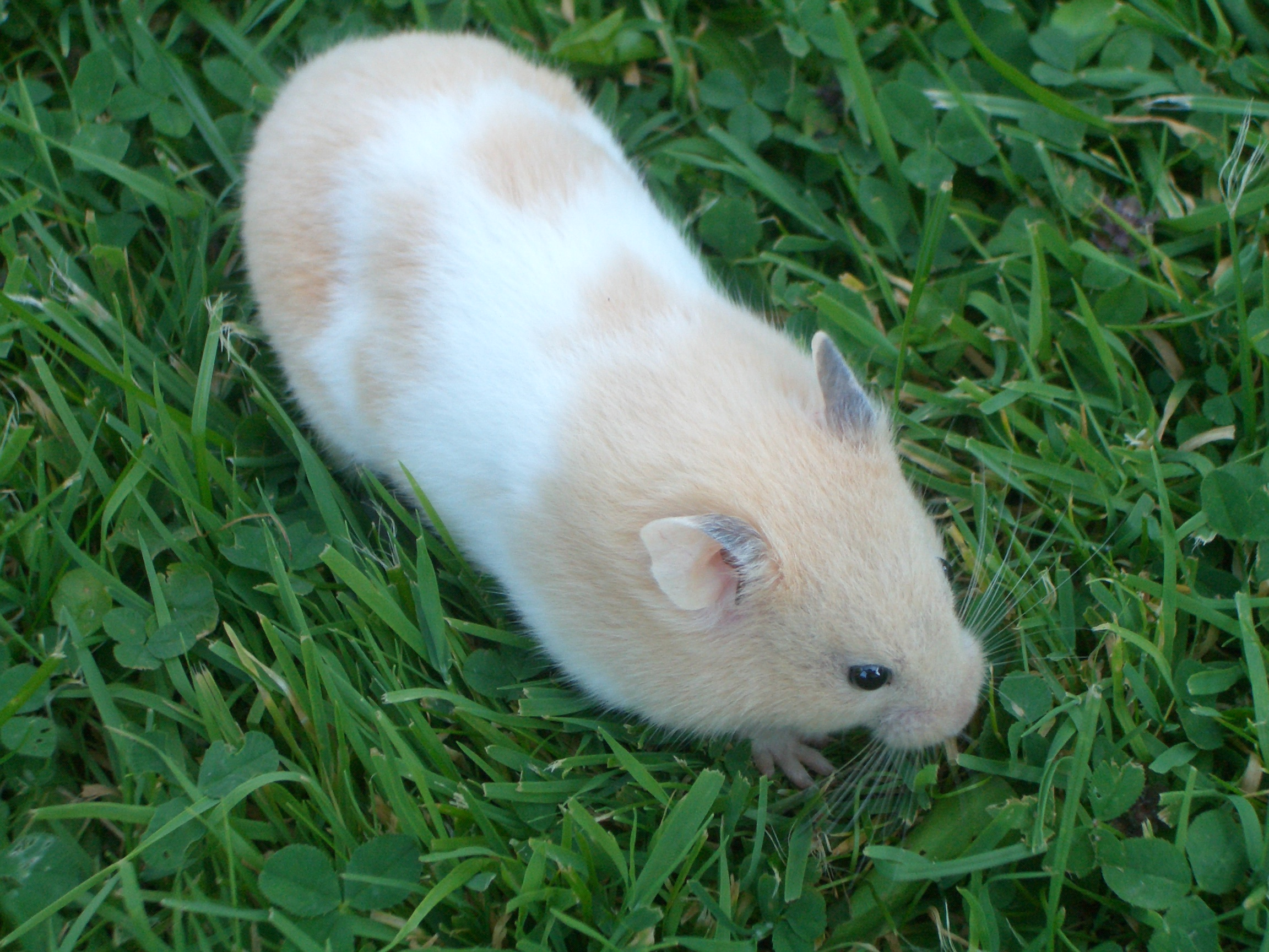 Hamster im Gras